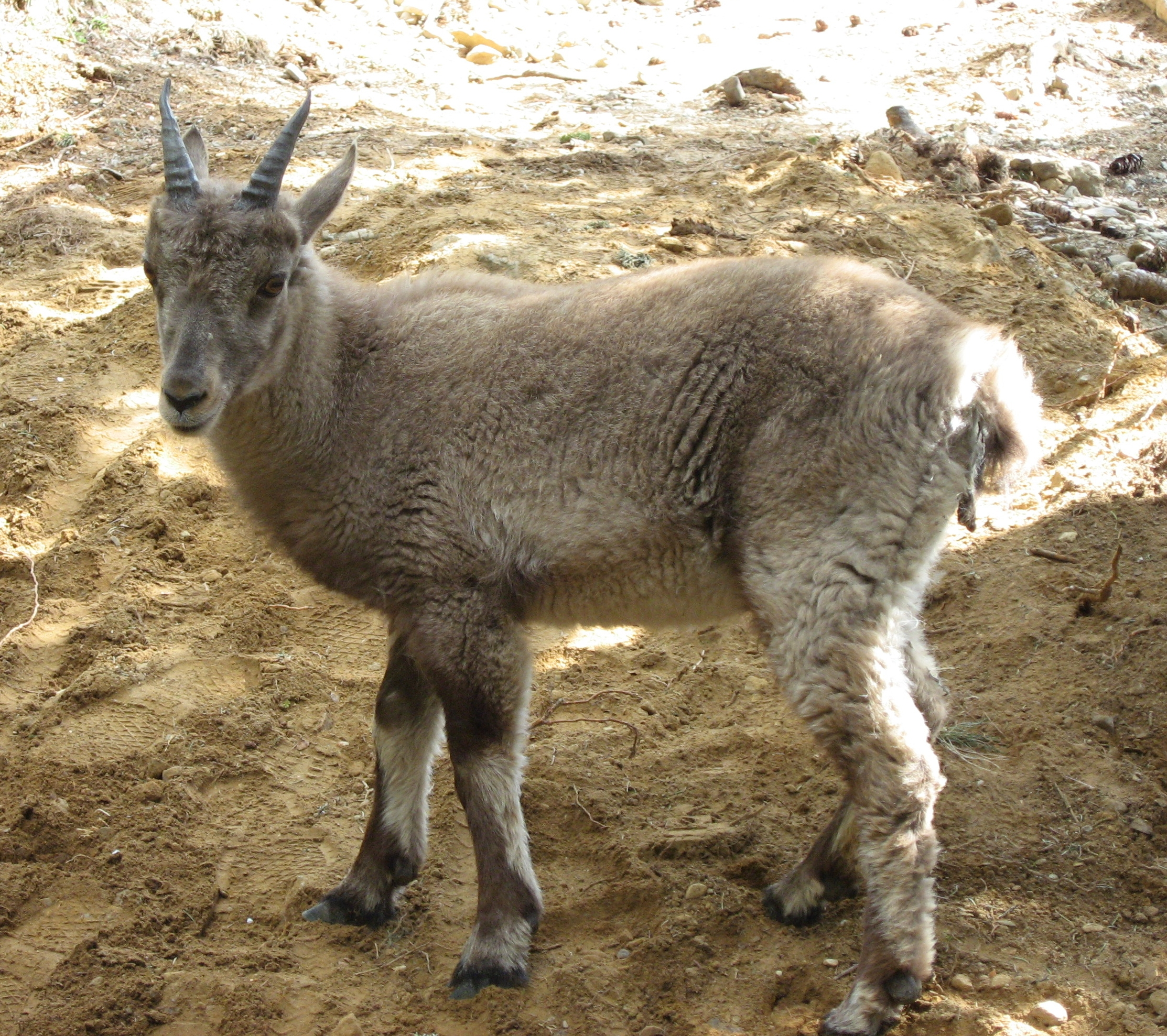 Capra ibex named Obelix in Parc de Merlet (Bouquetin) Map: 45° 54' 26" N 6° 49' 2" E